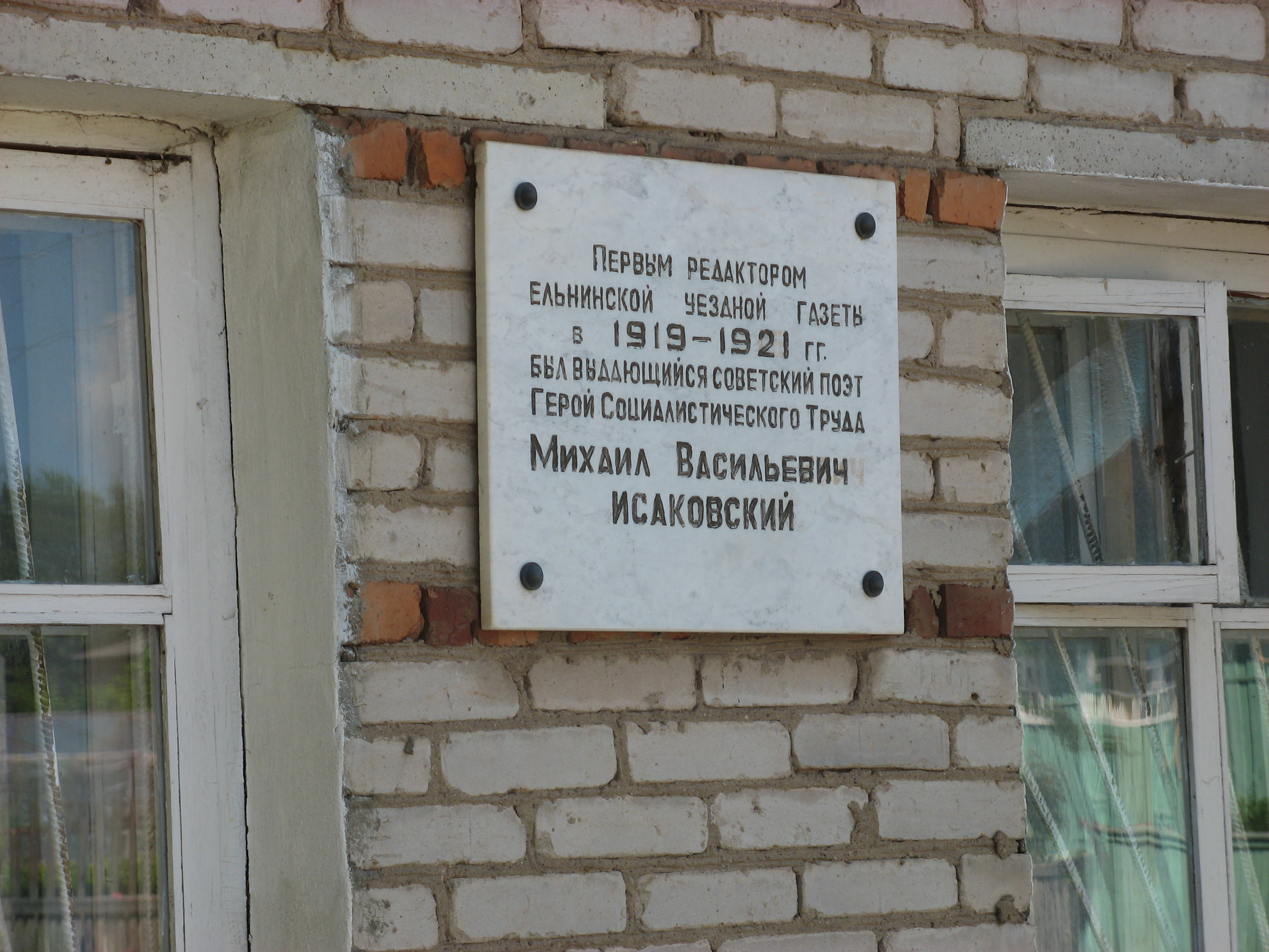 Памятный знак Исаковскому М.И. на стене здания районной газеты Знамя в Ельне